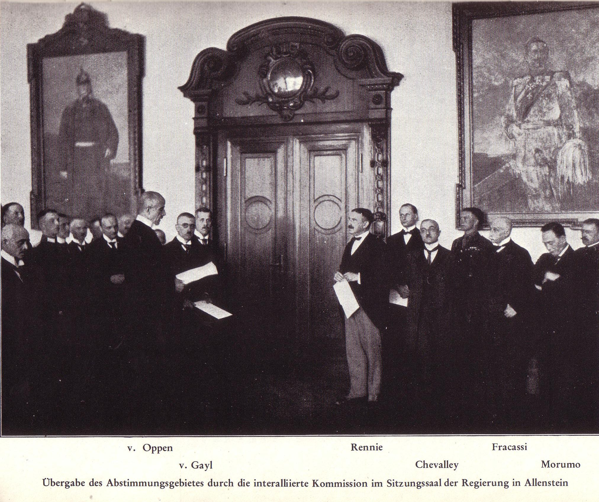 Die Übergabe des masurischen Abstimmungsgebietes im Gebäude des Regierungspräsidenten in Allenstein am 16. August 1920.